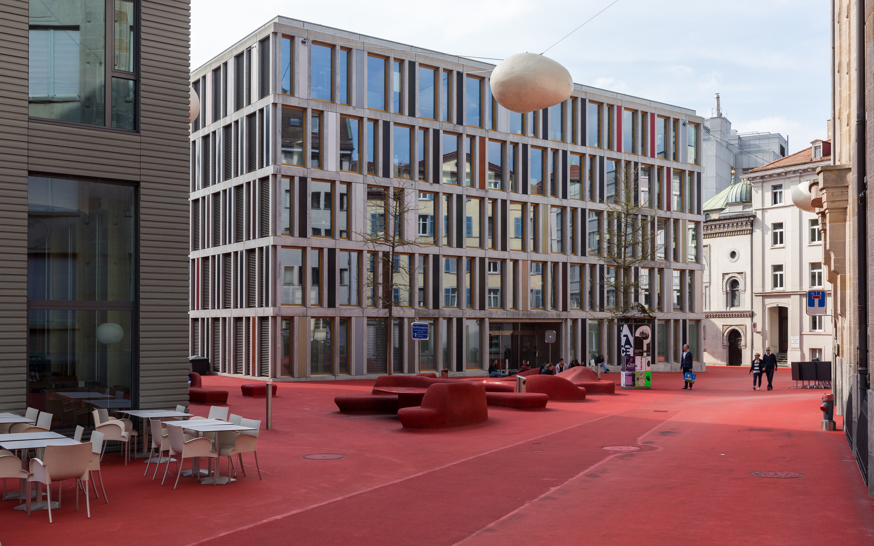 Stadtlounge auf dem Raiffeisenplatz in St. Gallen umgeben von Gebäuden von Raiffeisen Schweiz, im Hintergrund ist noch die Synagoge zu erkennen.